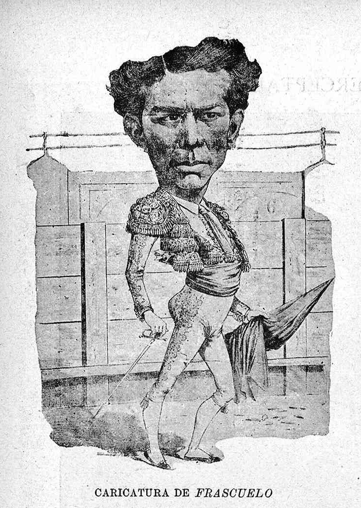 Frascuelo.